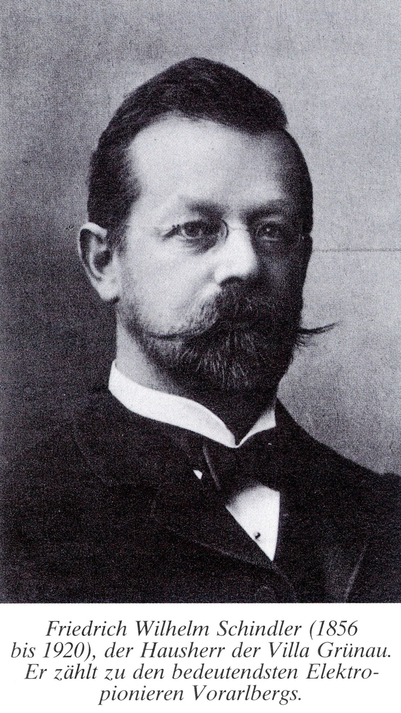 Friedrich Wilhelm Schindler geboren am 1. Juni 1856 in Mollis, Schweiz; gestorben am 19. November 1920 in Kennelbach, Österreich) war ein österreichischer Unternehmer und Erfinder. Außerdem war er der Neffe von Dietrich Schindler.